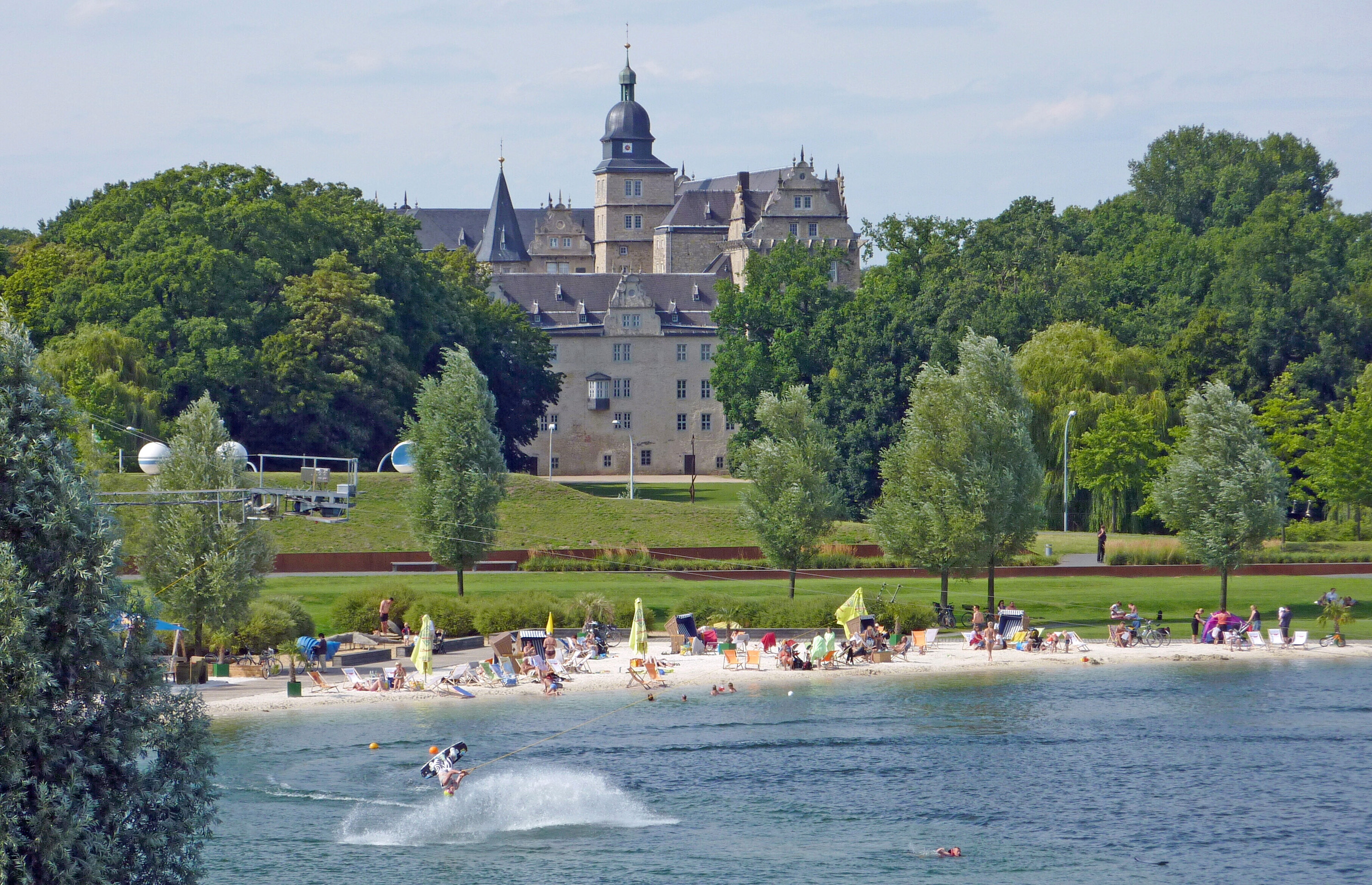 Wakeboarding im Allerpark, Schloss Wolfsburg im Hintergrund